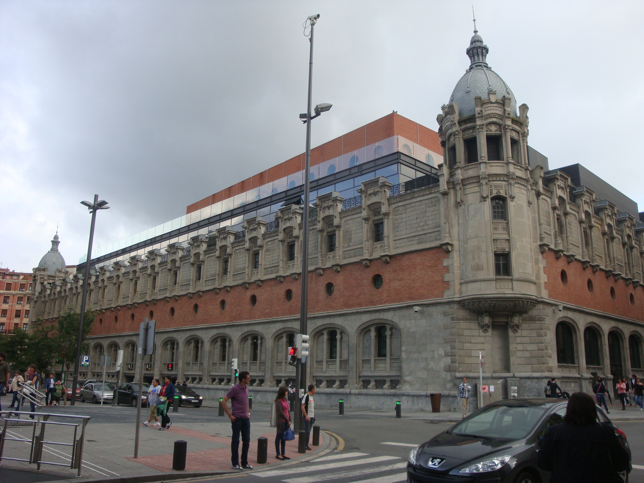 Centre culturel et de loisirs Alhondiga, Bilbao, P. Starck